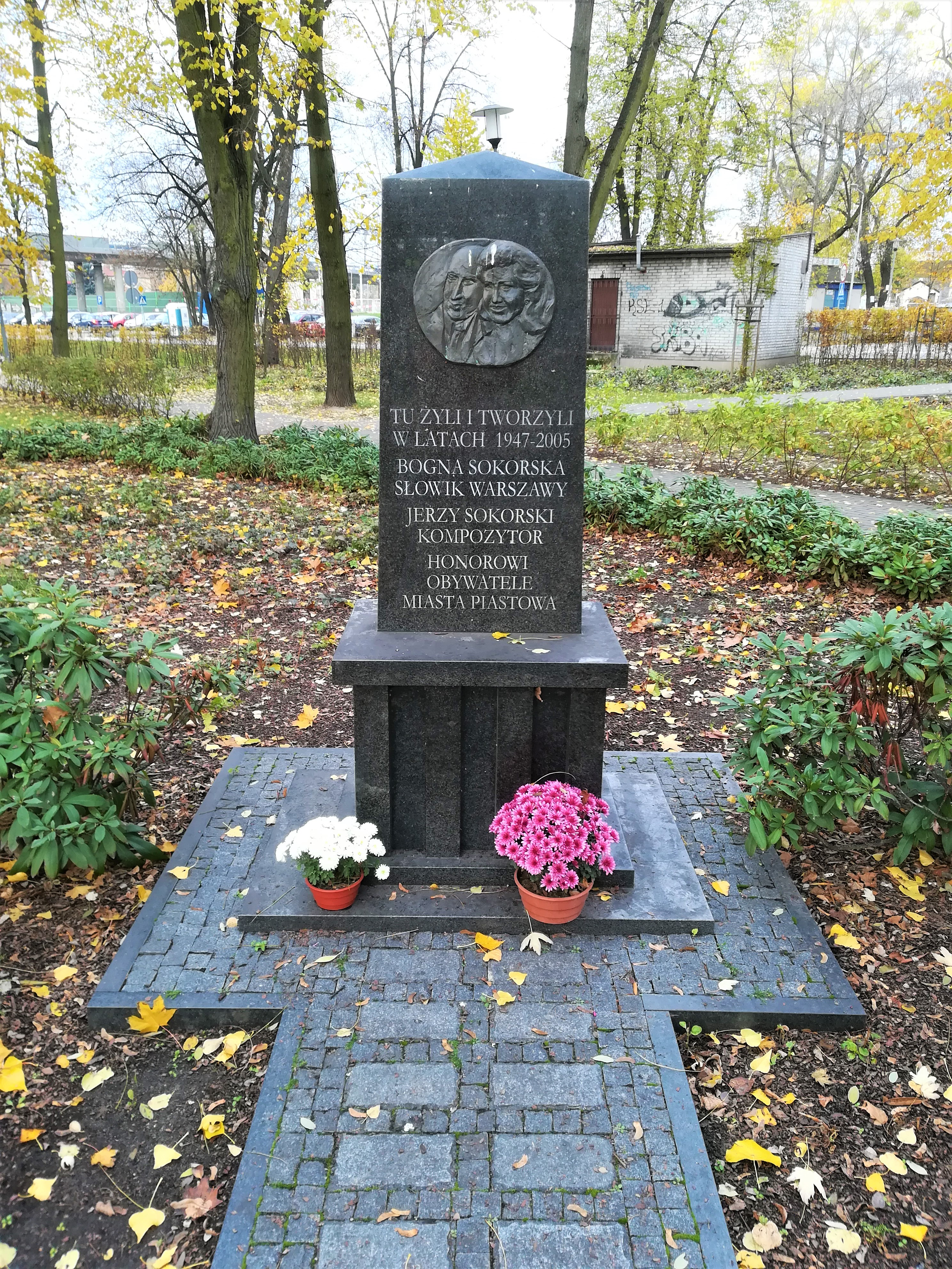 Pomnik Bogny i Jerzego Sokorskich w Piastowie w parku ich imienia.